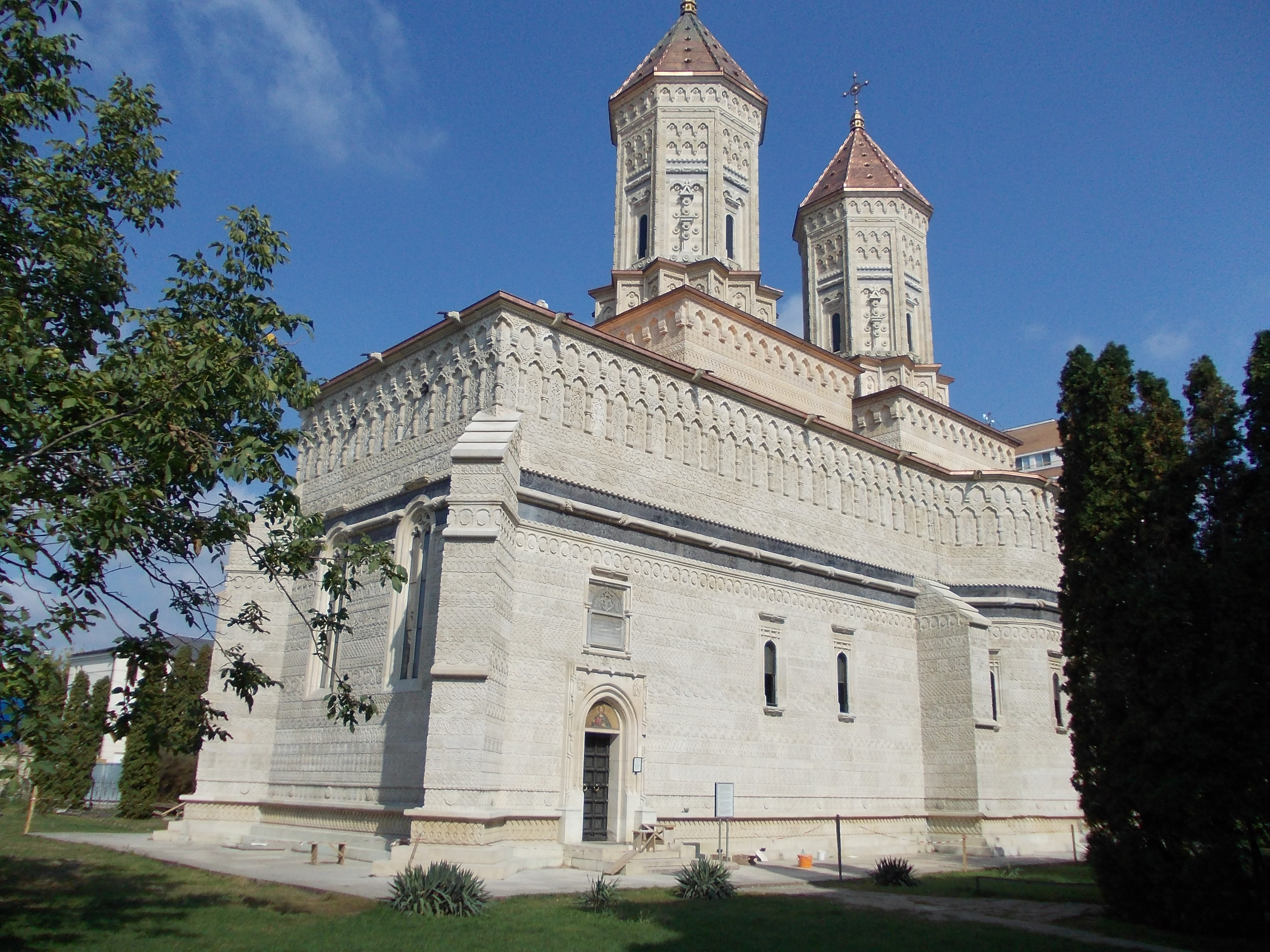 Biserica "Sf. Trei Ierarhi" 01